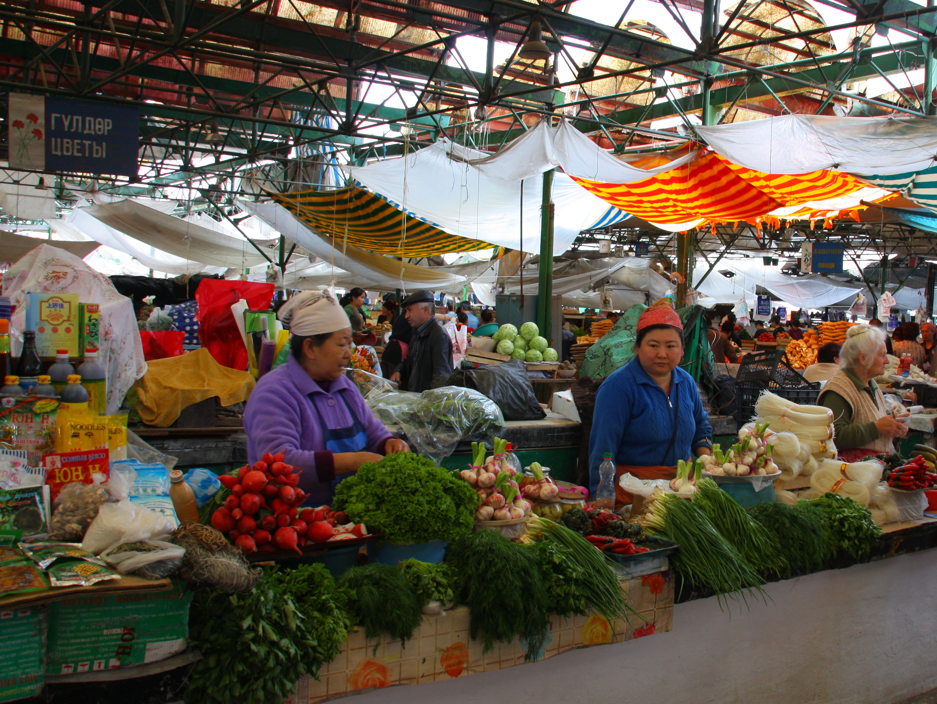 Osh Bazaar in Bishkek, Kyrgyzstan